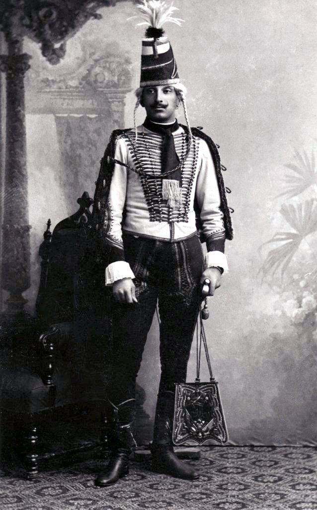 Alexander Wassilko von Serecki in Husarenuniform 1893 This work is in the public domain in its country of origin and other countries and areas where the copyright term is the author's life plus 100 years or fewer. You must also include a United States public domain tag to indicate why this work is in the public domain in the United States. This file has been identified as being free of known restrictions under copyright law, including all related and neighboring rights.